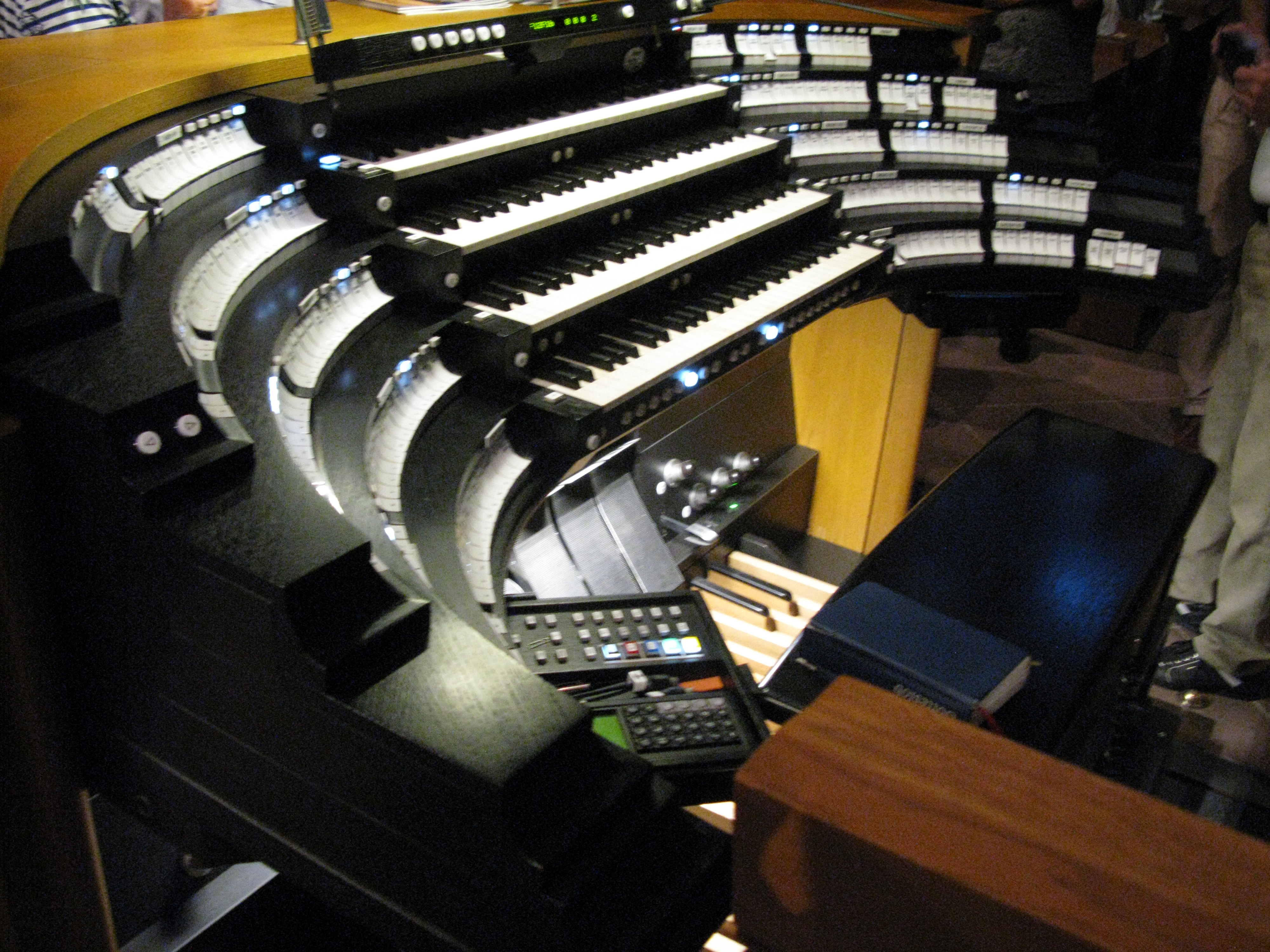 Hauptspieltisch der Orgeln des Freiburger Münsters